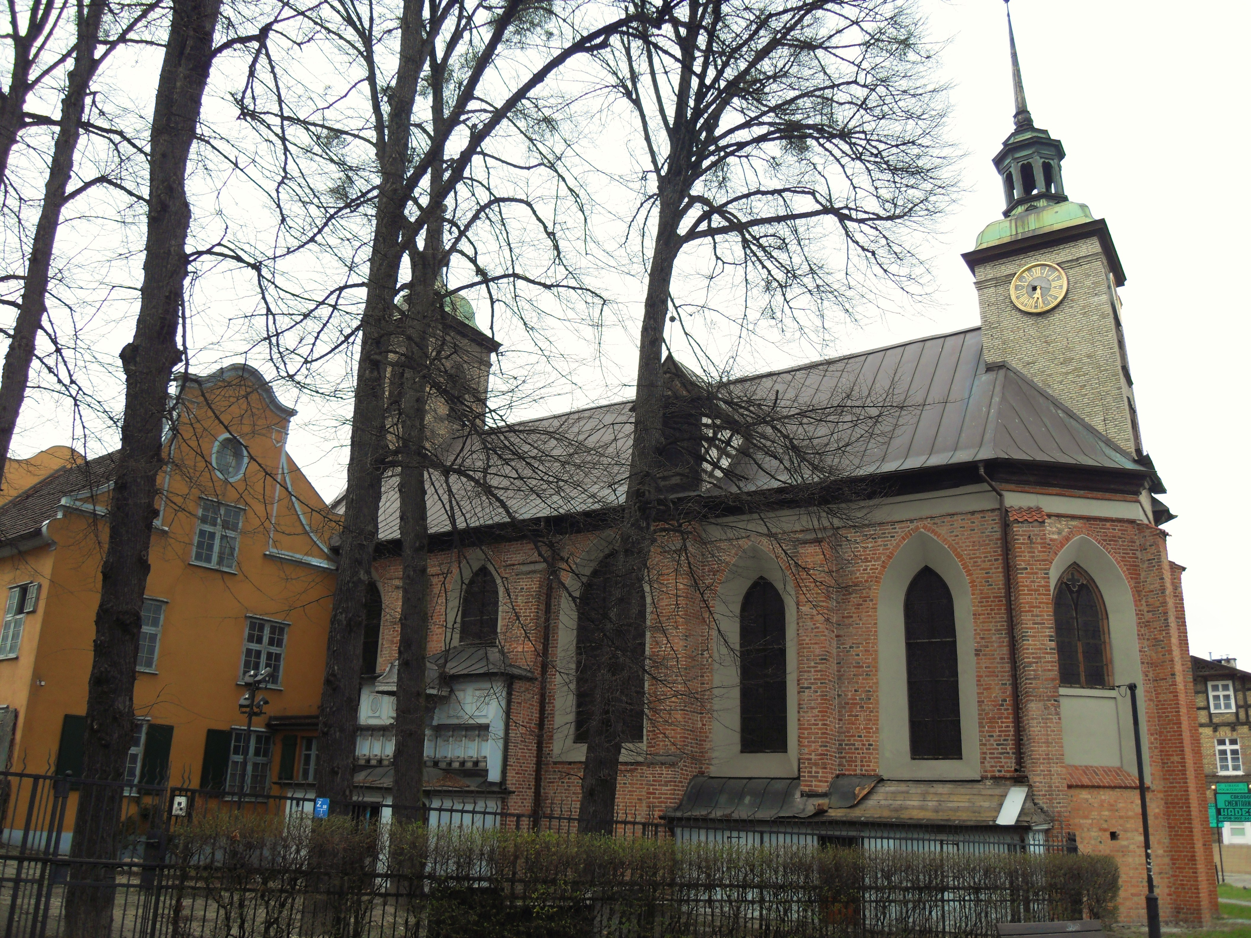 Gdańsk Śródmieście, kościół pw. Bożego Ciała.